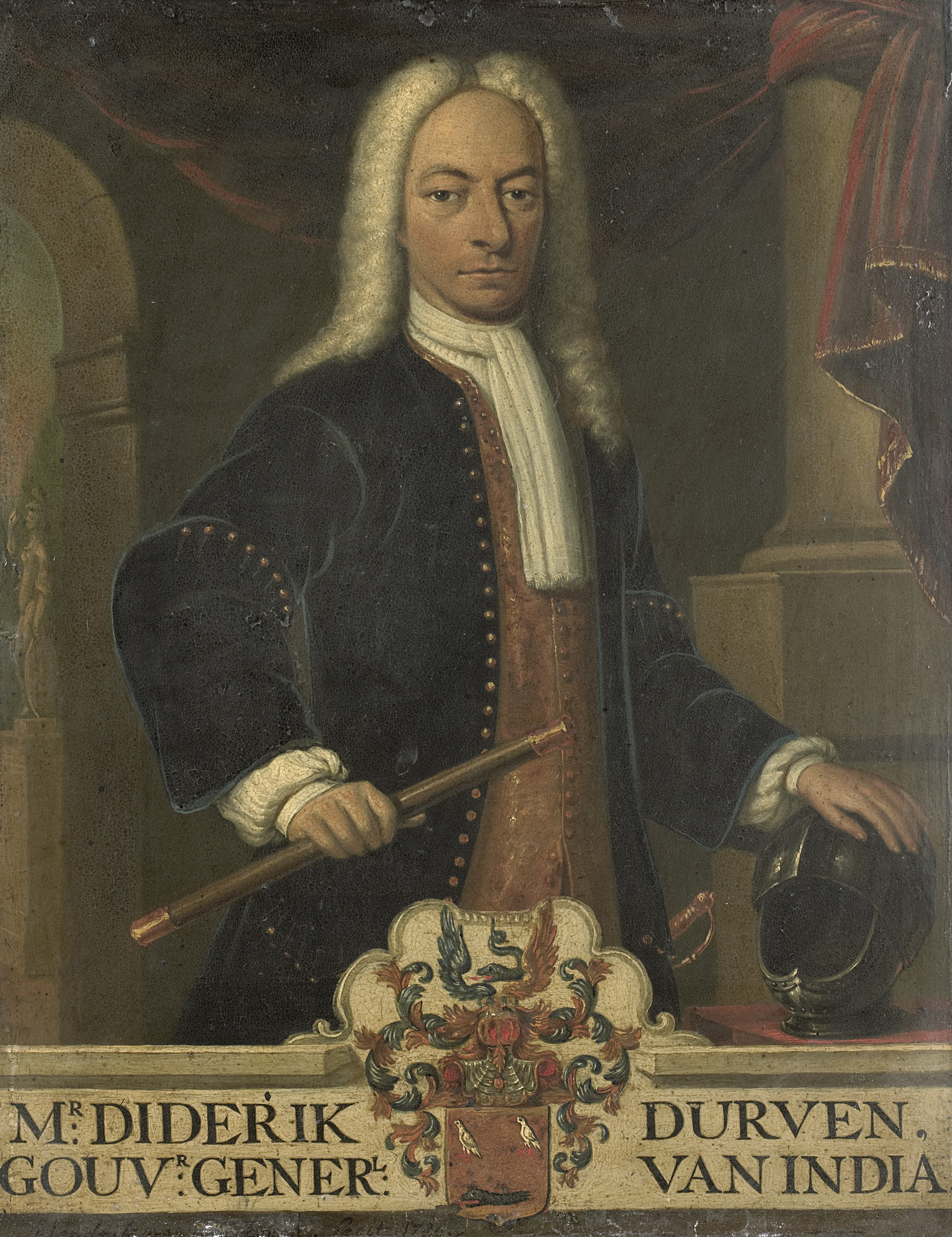 Portret van Diederik van Durven (1676-1740). Gouverneur-generaal (1729-30). Ten halven lijve, iets naar rechts, het gelaat aanziend. In de rechterhand een commandostaf, de linkerhand rustend op een helm. Staande in een interieur, rechts een zuil, links op de achtergrond een beeldhouwwerk op een sokkel. Onderdeel van een reeks van kopieën naar portretten van de gouverneurs-generaal van het voormalige Nederlands Oost-Indië, waarschijnlijk afkomstig van de Verenigde Oostindische Compagnie. Collection: schilderijen; Gouverneurs-generaal serie